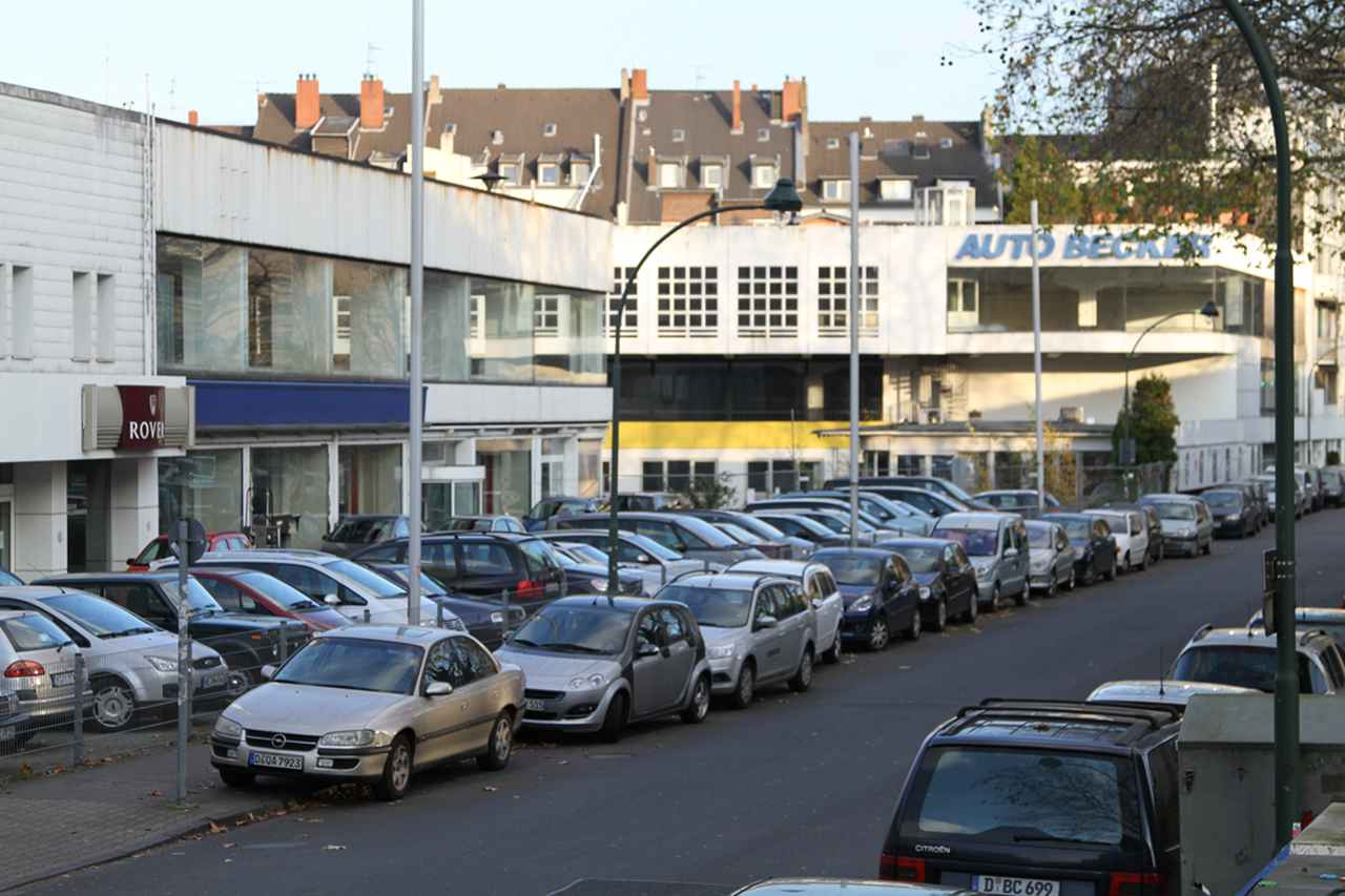 Auto Becker in Düsseldorf